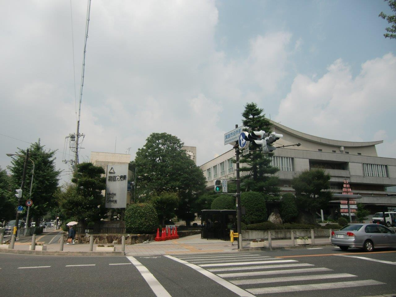 箕面市役所を府道43号線を挟んで、東側より撮影